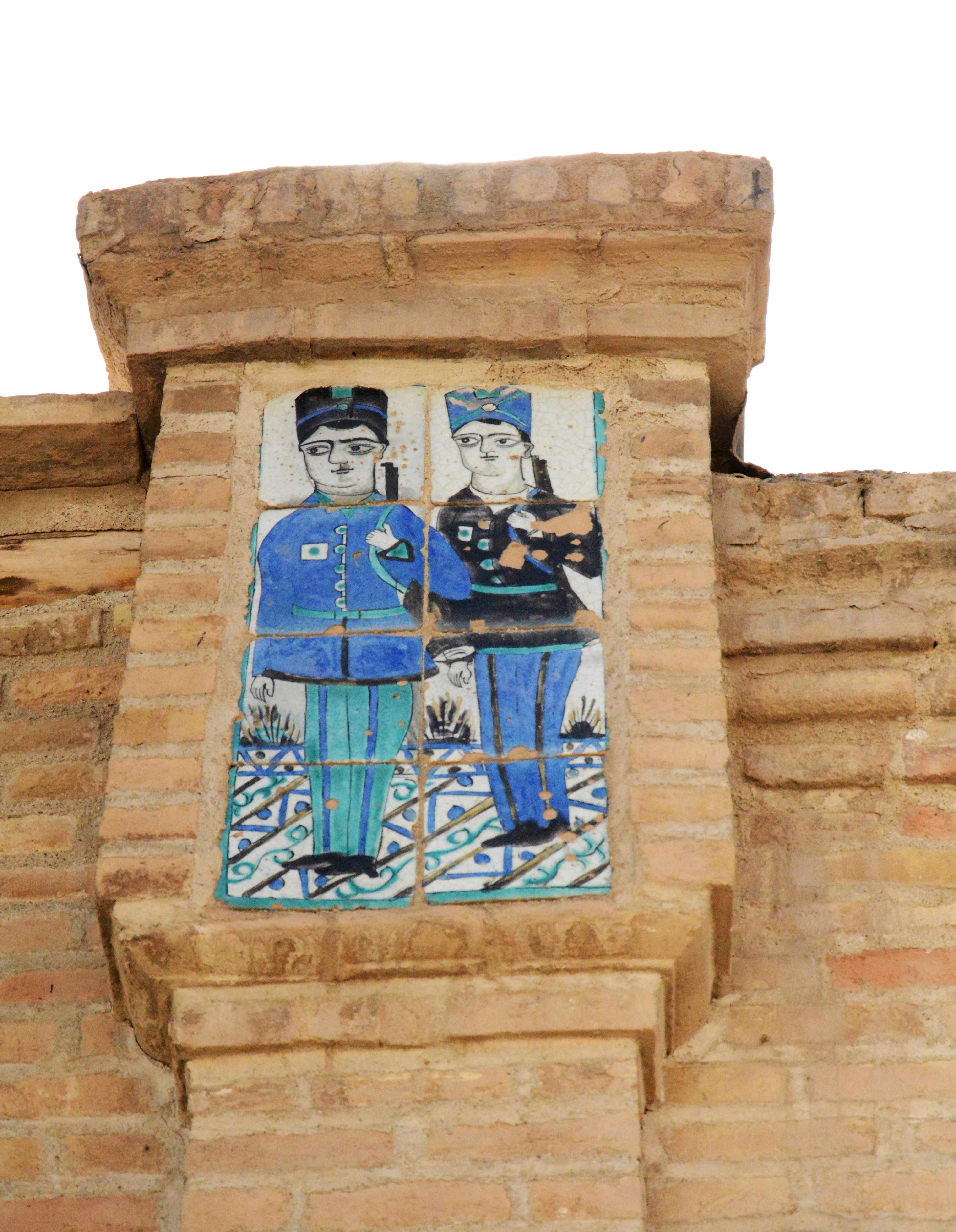 حمام حاجی رئیس